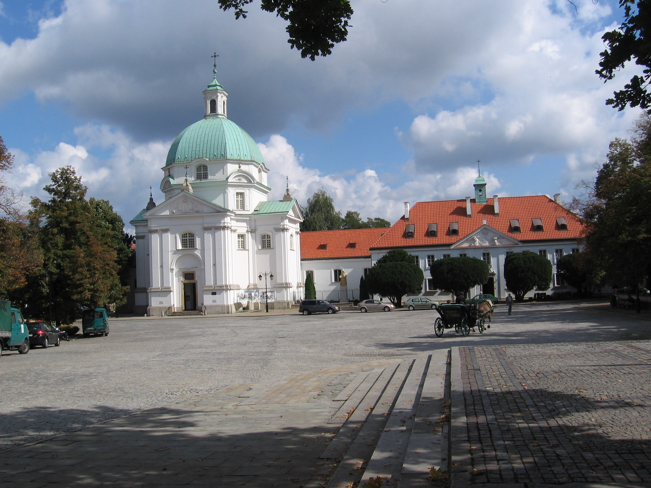 Варшава. Старе място